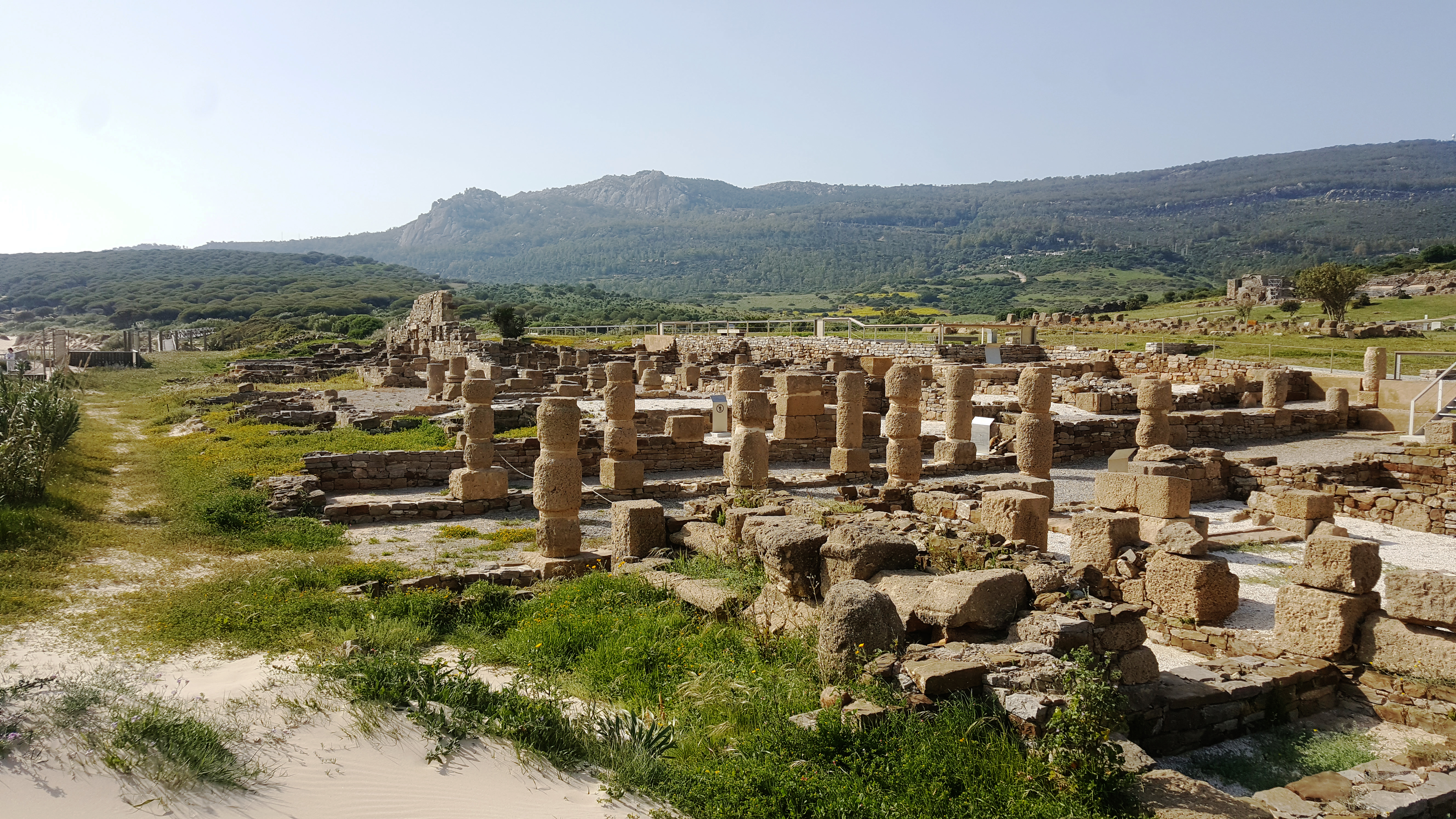 ruinas_playa_tarifa